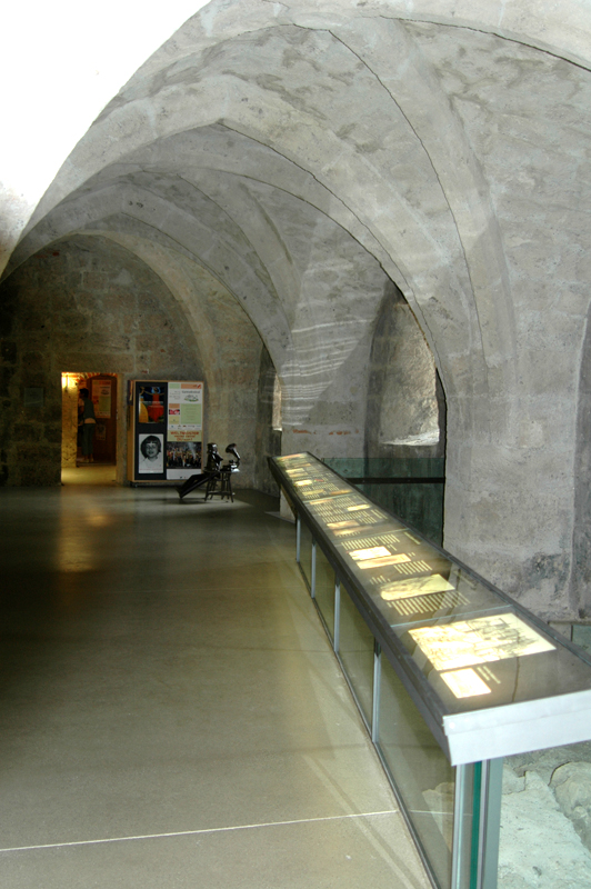 Burg zu Burghausen, Erdgeschoss der Dürnitz (Besucherzentrum)